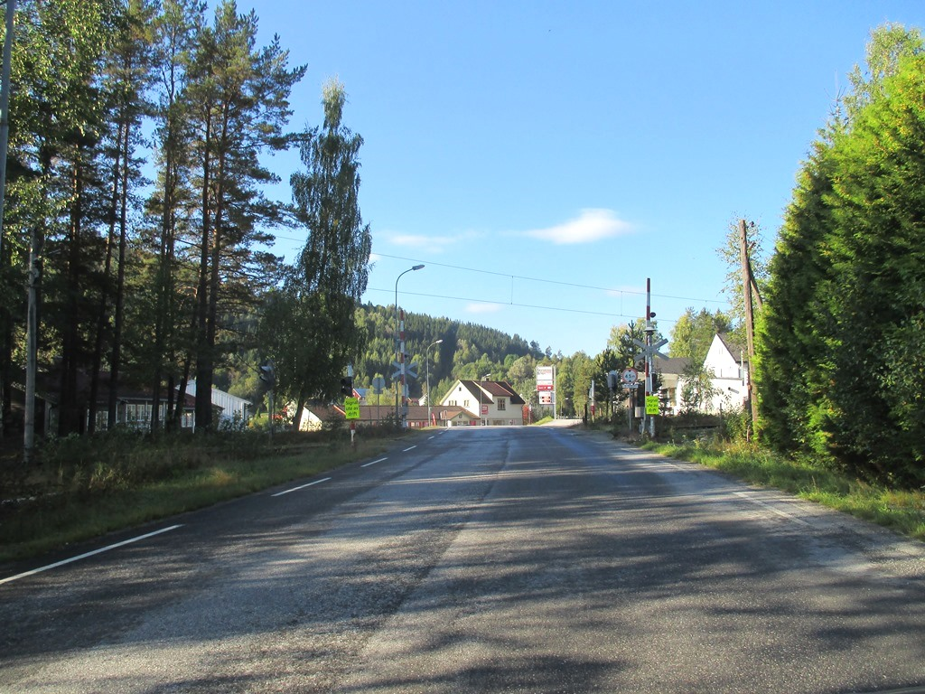 Primær fylkesvei 37 krysser Tinnosbanen på planovergang vest for tidligere Gransherad stasjon.